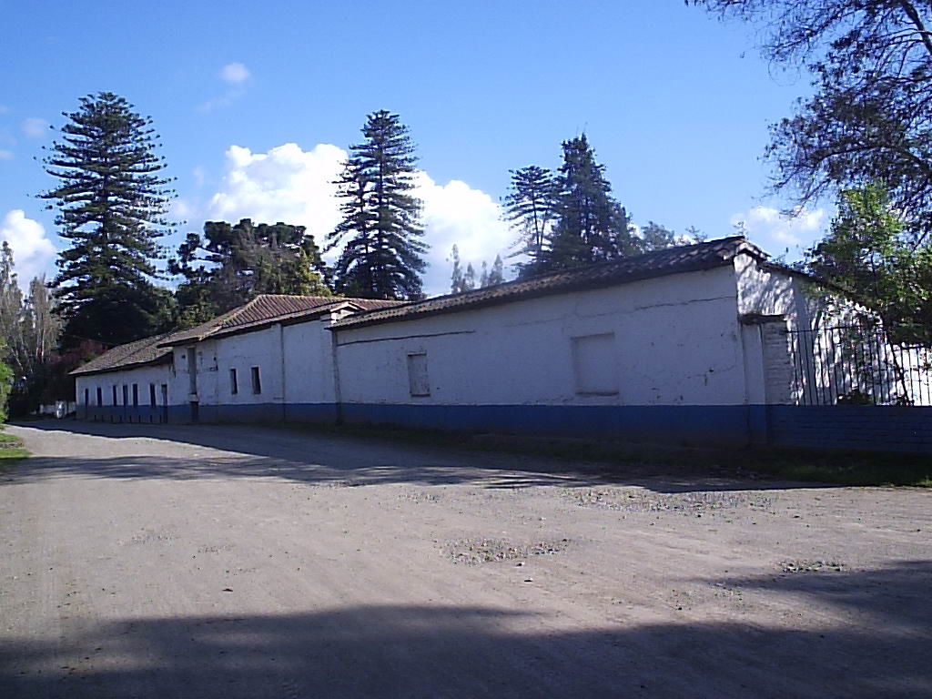 Fachadas exteriores de las bodegas del Fundo San Miguel de El Monte, (Región Metropolitana - Chile)